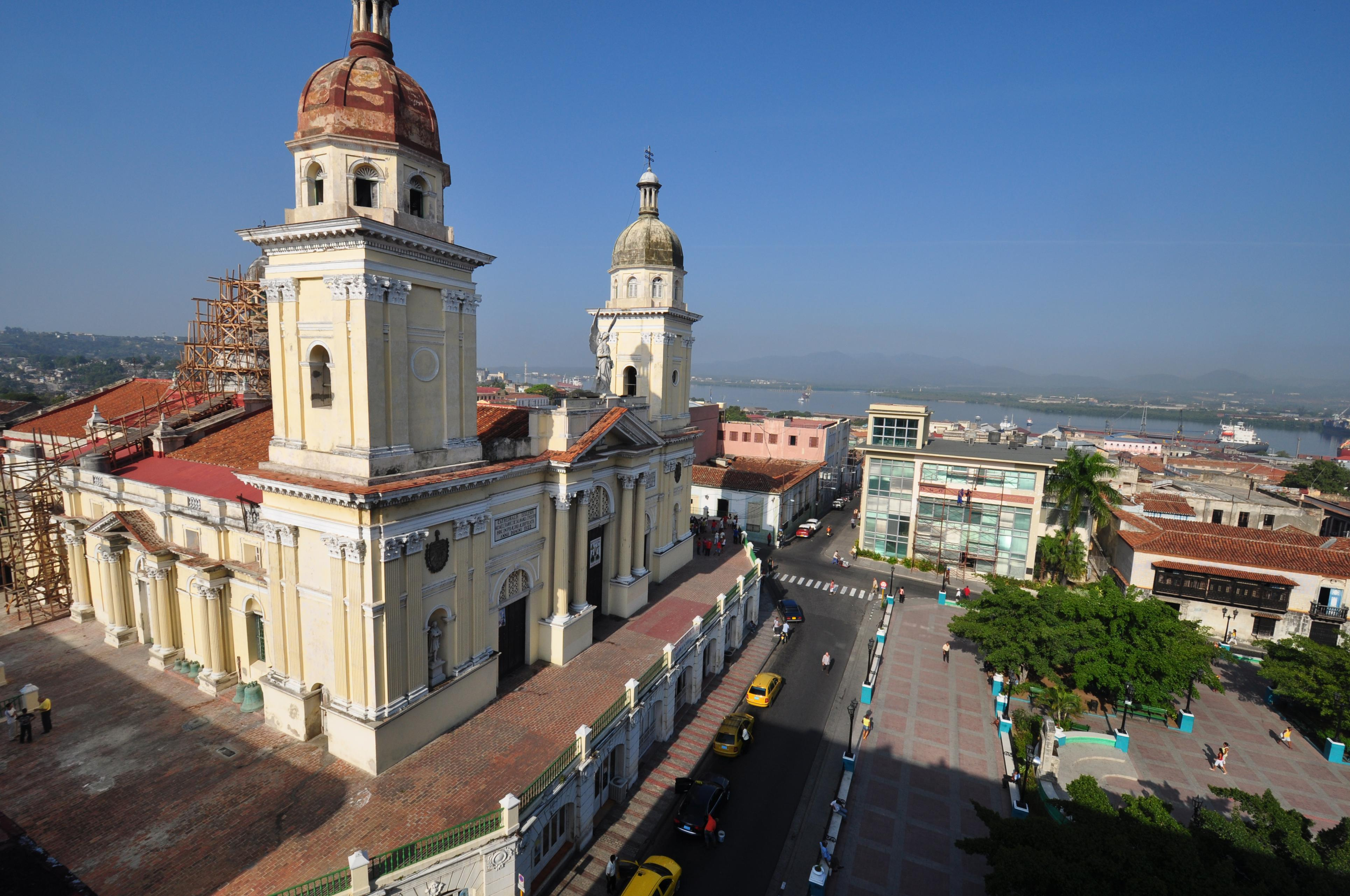 Vista del torres de la Catedral Nuestra Señora de la Asunción, y centro historico de Santiago de Cuba.